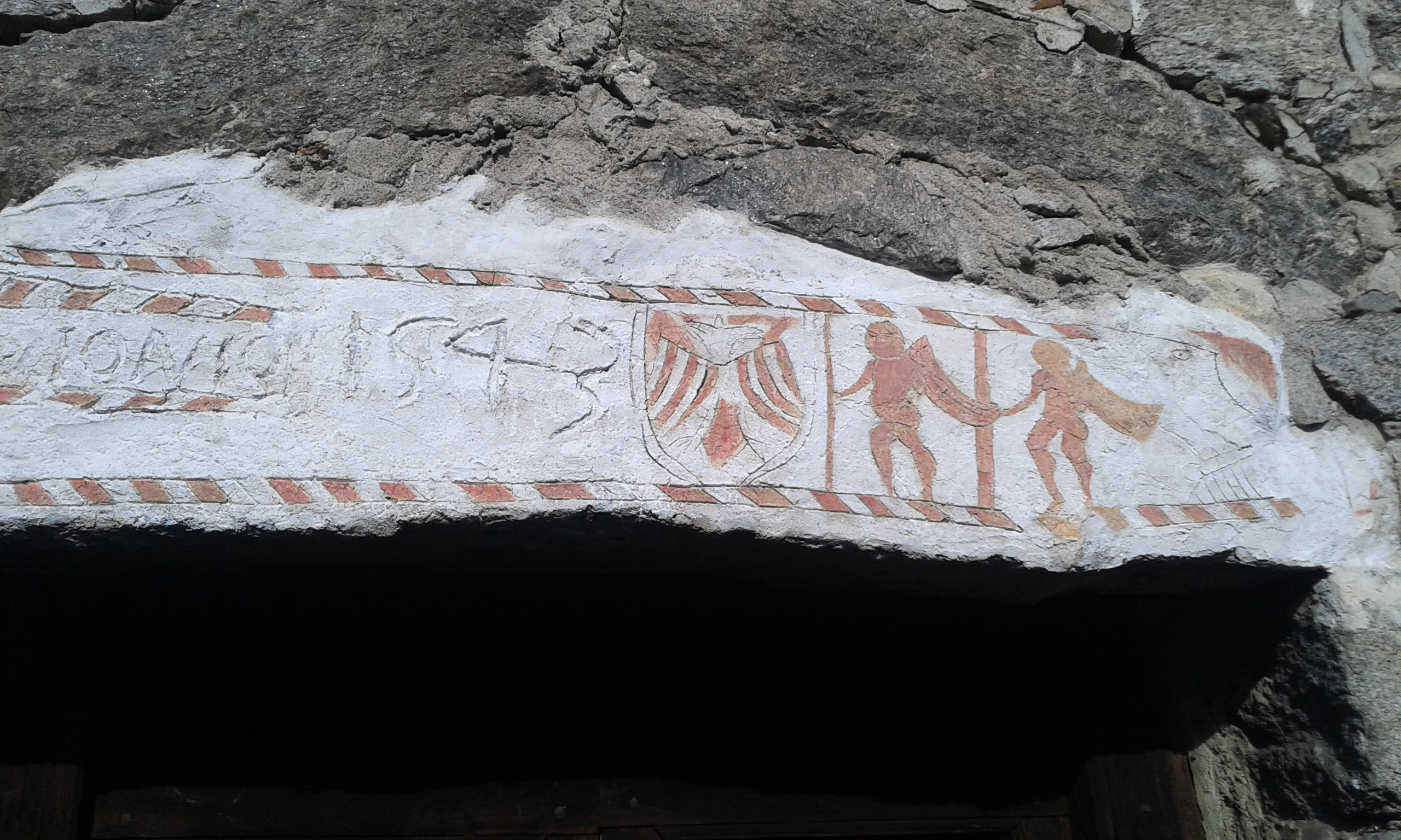 Incisione su architrave.